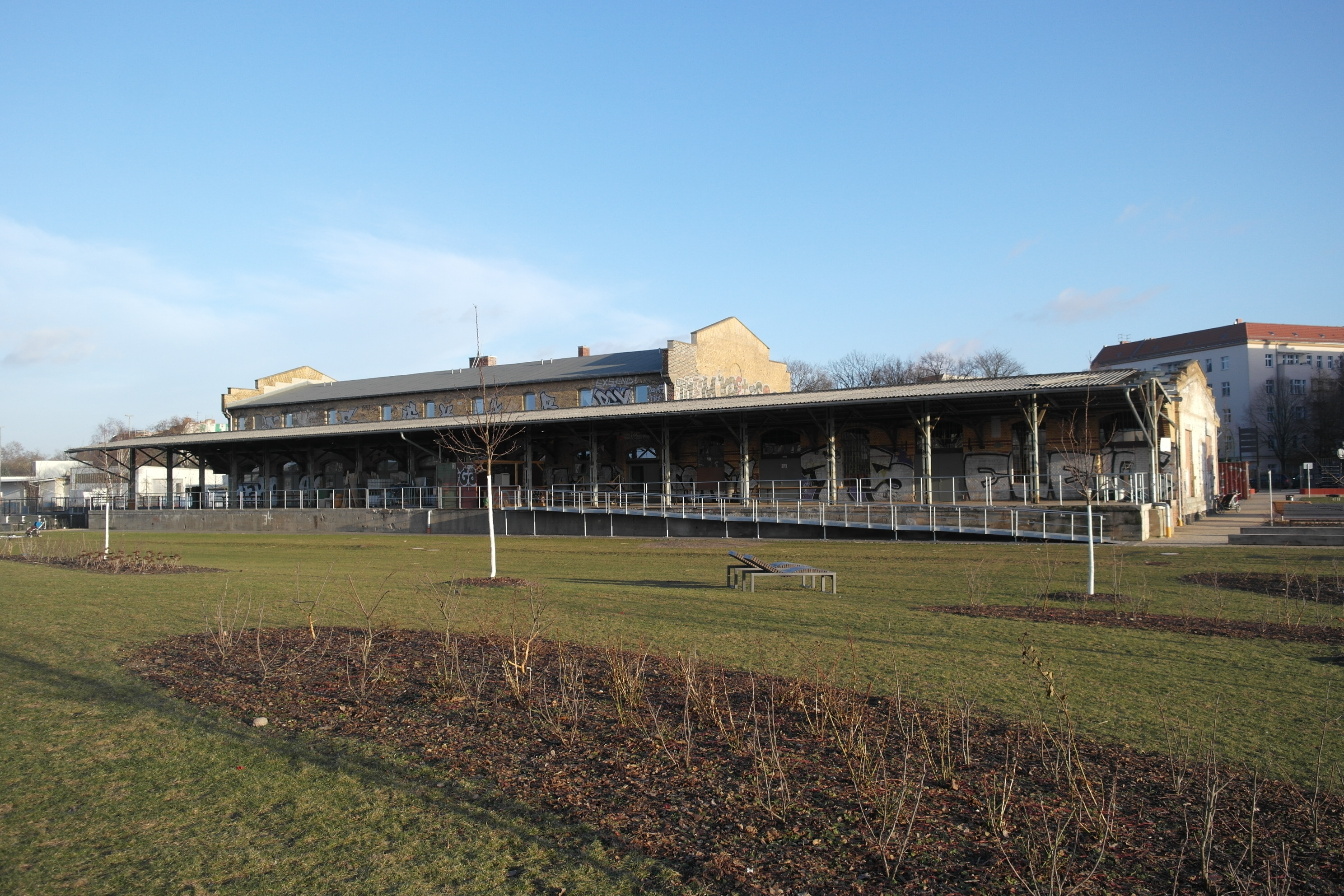 Güterhalle im ehemaligen Güterbahnhof Moabit, nun das Zentrum für Kunst und Urbanistik